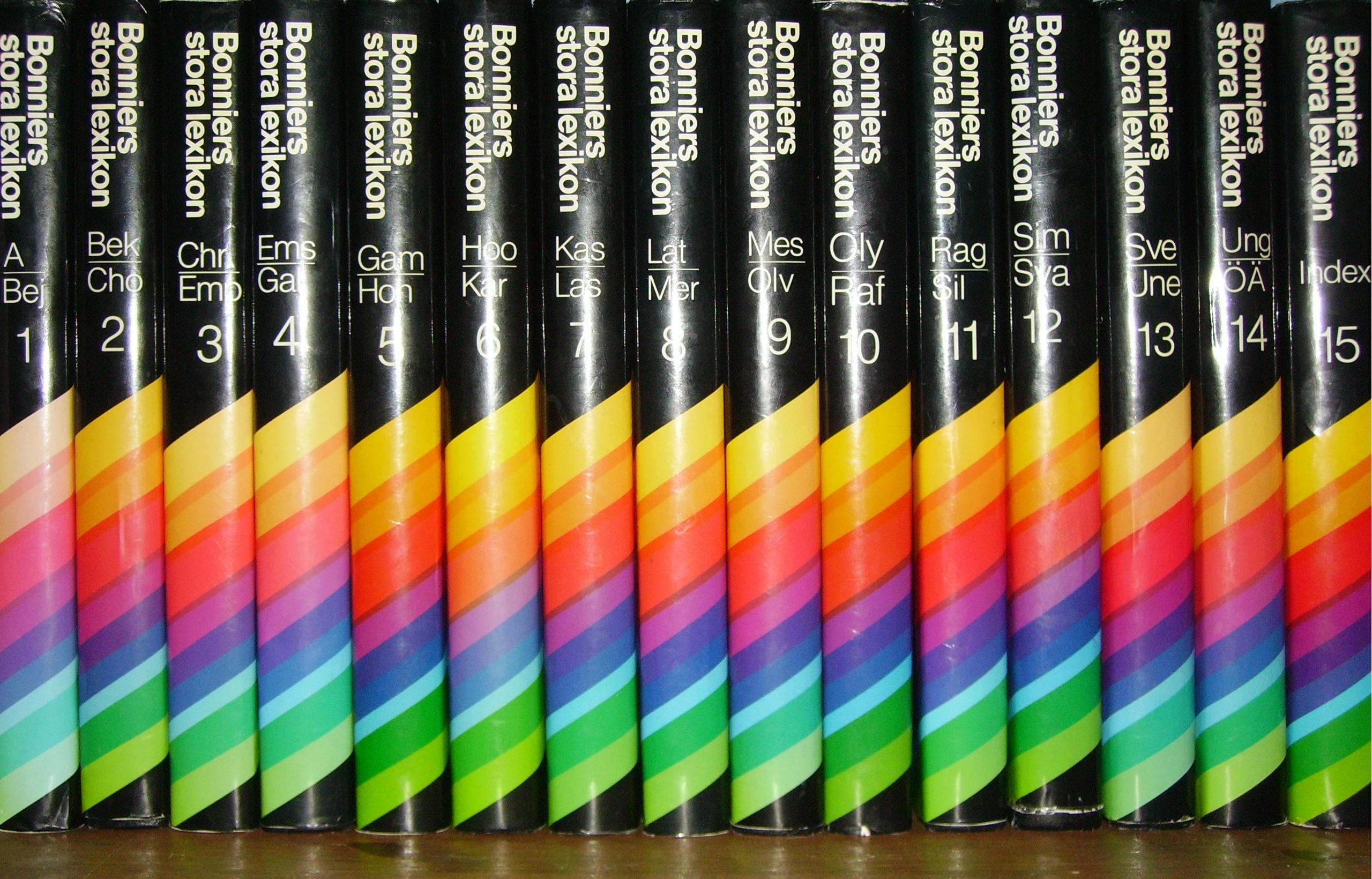 Bonniers Stora Lexikon